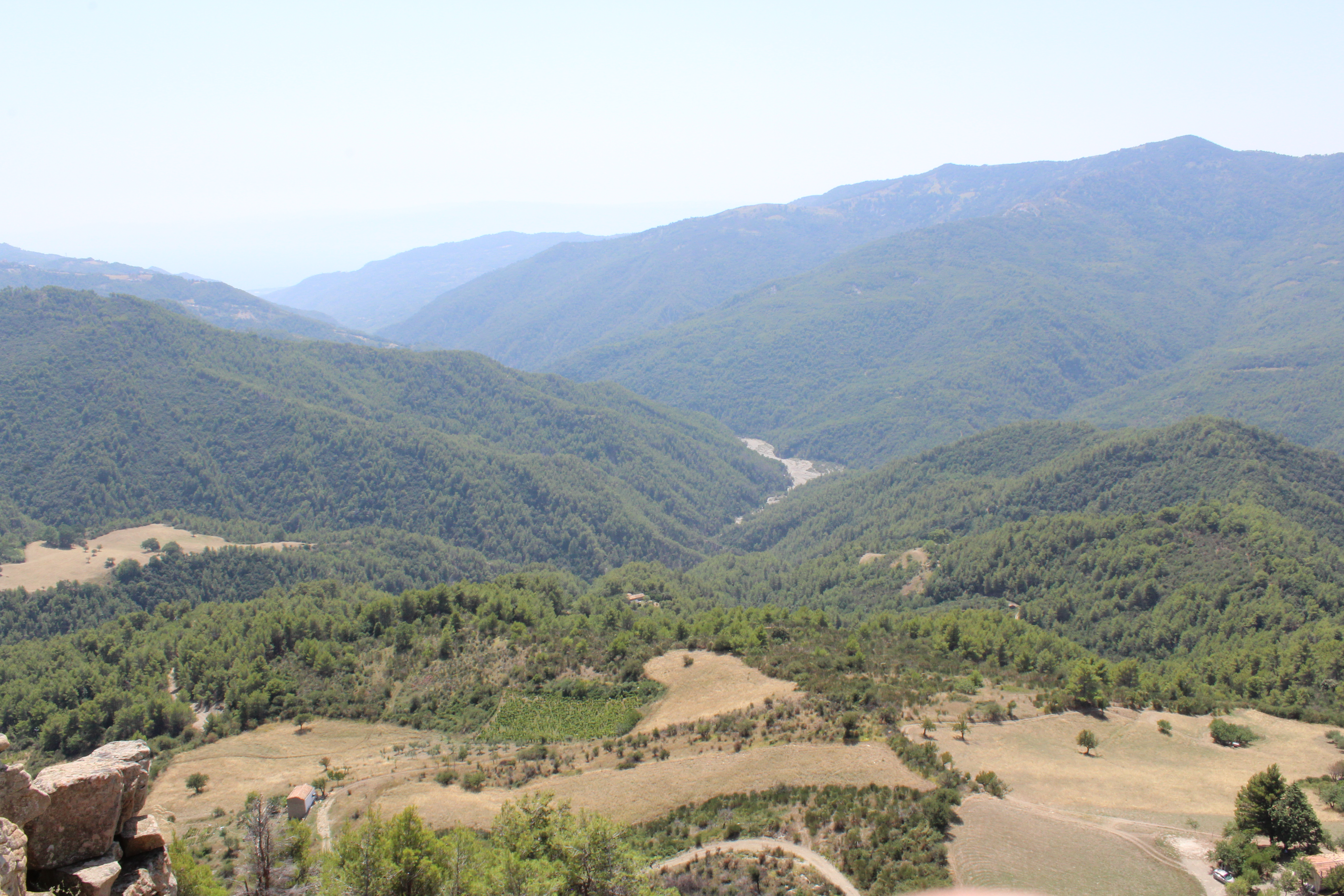 Valle del Saraceno da Timpone del Pico